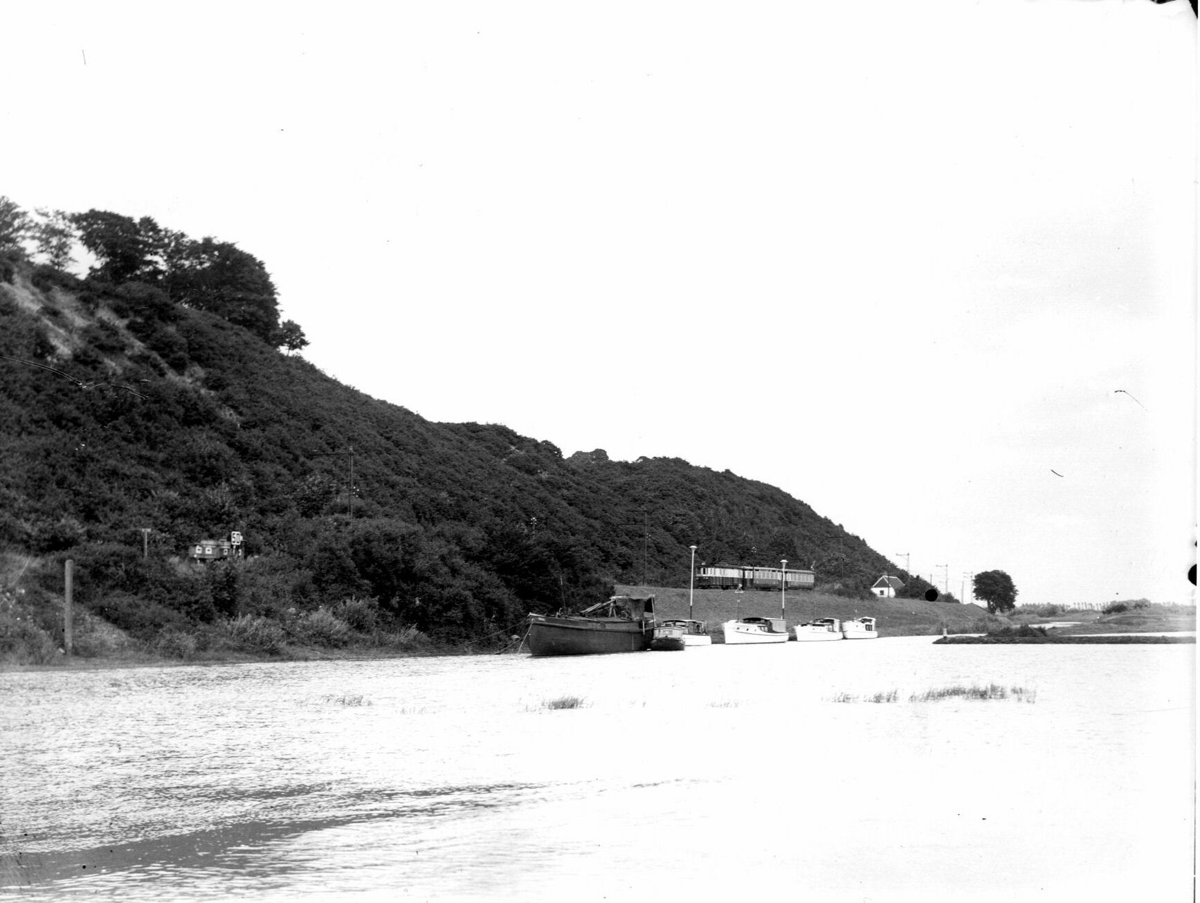 De Grebbeberg omsteeks 1925. Gezien in Oostelijke richting bij de ingang van de Grift.